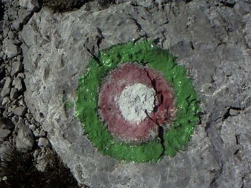 Knafelčeva markacija z zelenim kolobarjem. Nekdaj je zeleni kolobar označeval zeleno mejo, obmejno območje z omejenim gibanjem. Slika je s Pece.